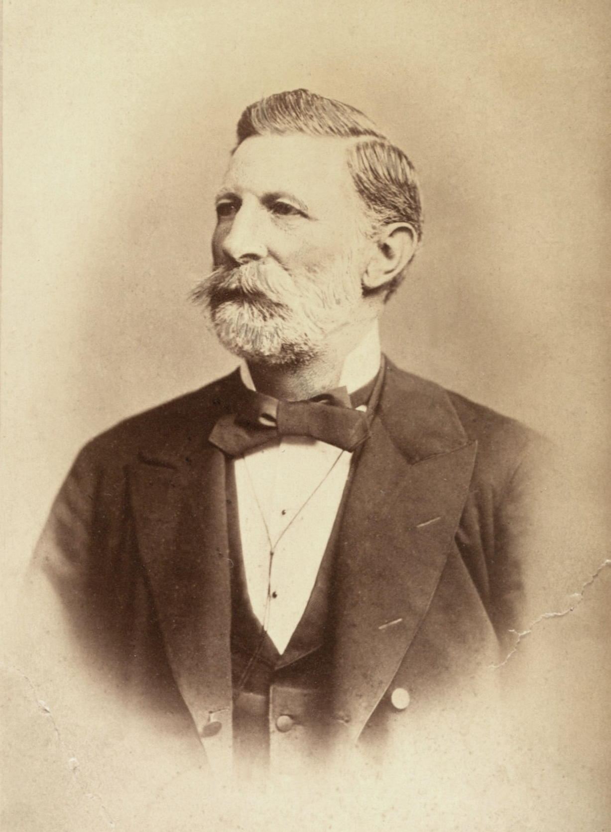 Porträtfotografie von Samuel Dörr (1824–1911)